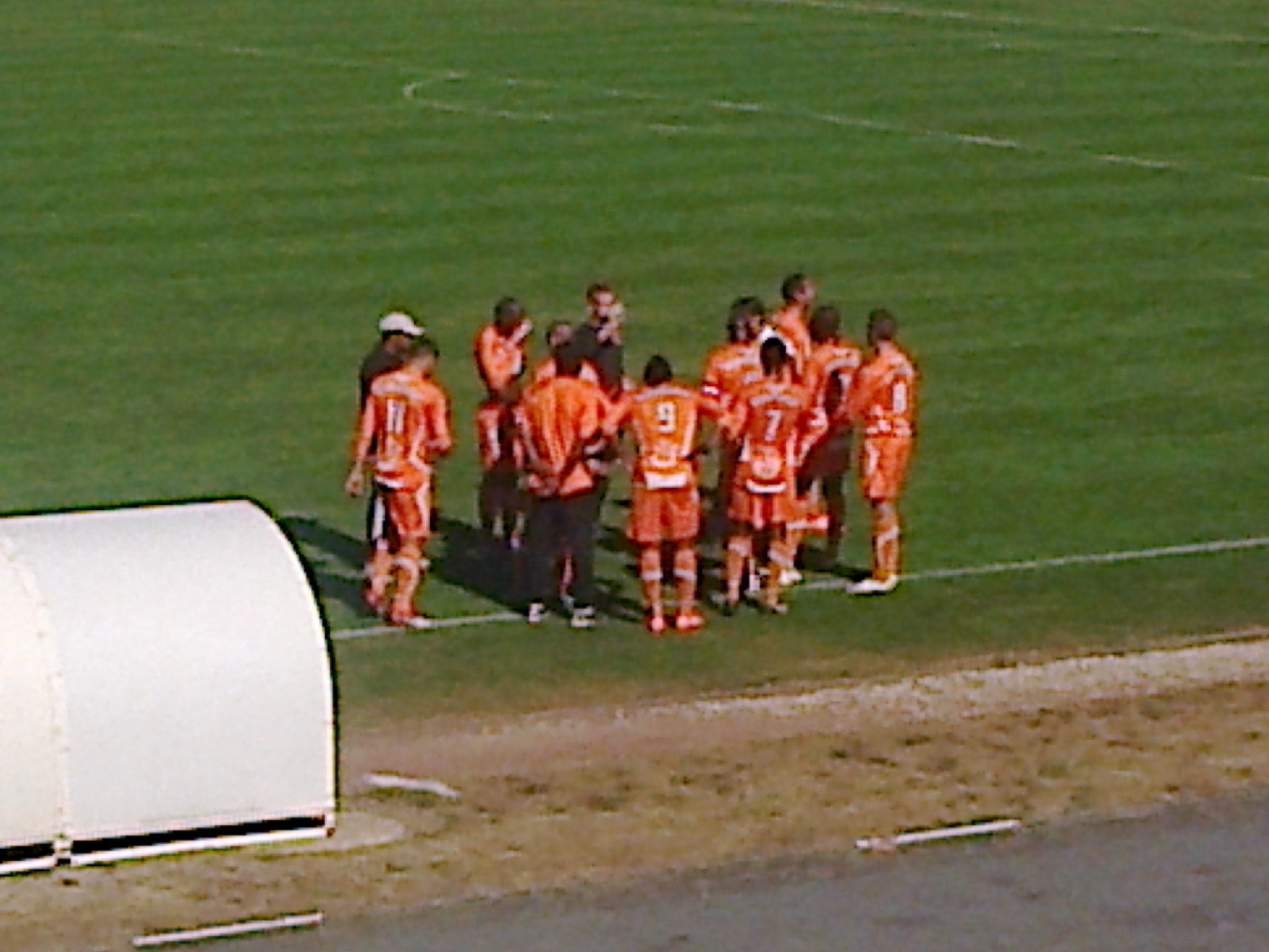 "Pause boisson" des joueurs de l'ACBB lors du match de DH contre le PSG C du 9 septembre 2012